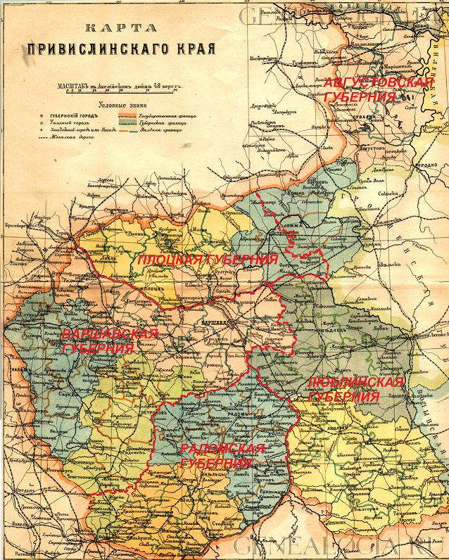 Карта Царства Польского в 1861 году. Map of Kingdom of Poland 1861